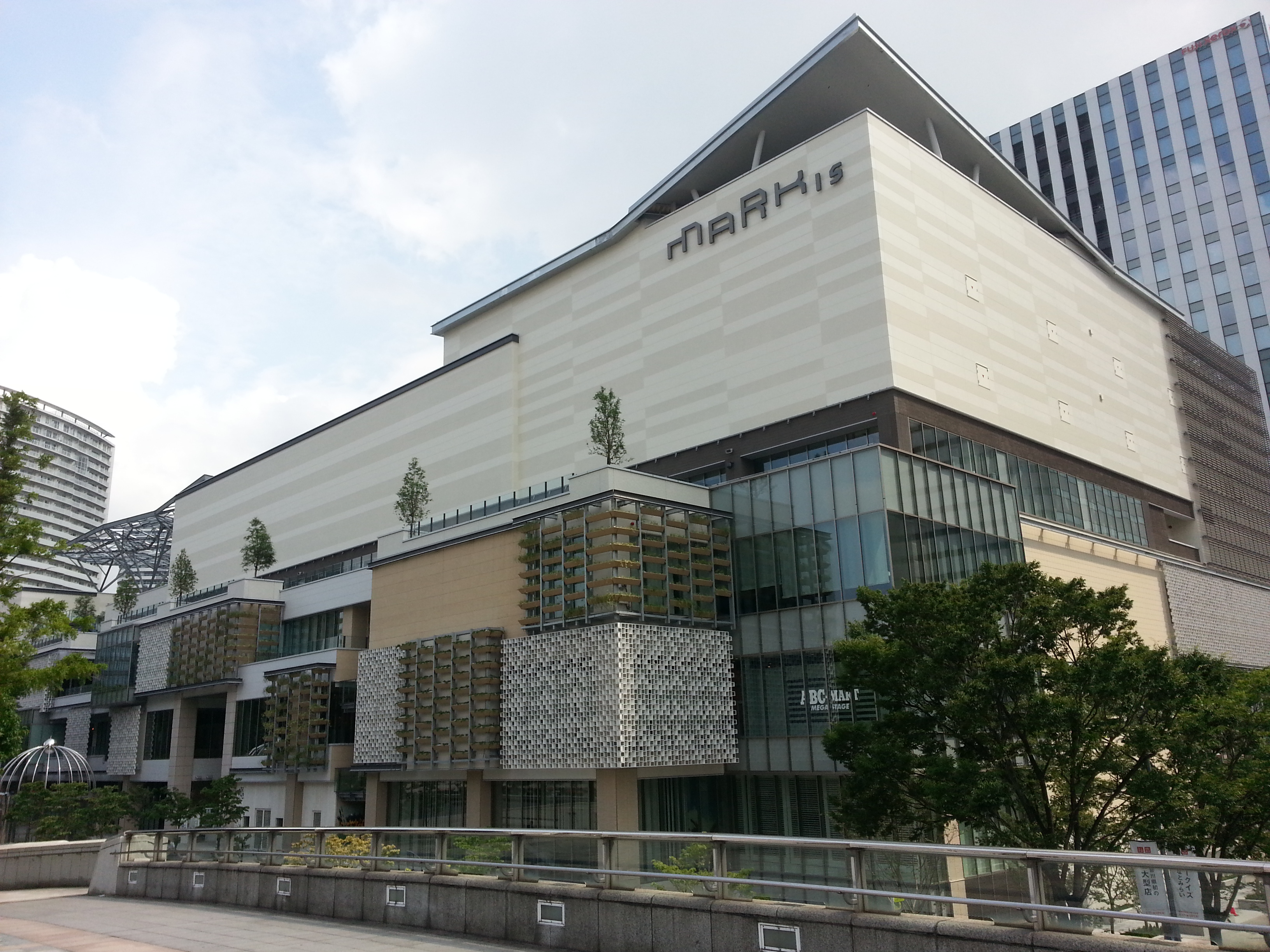 MARK IS みなとみらいの外観（横浜美術館手前の連絡橋より）。